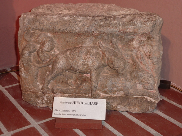 Römisches Relief aus Wallsee, dass einen Hund und einen Hasen zeigt.